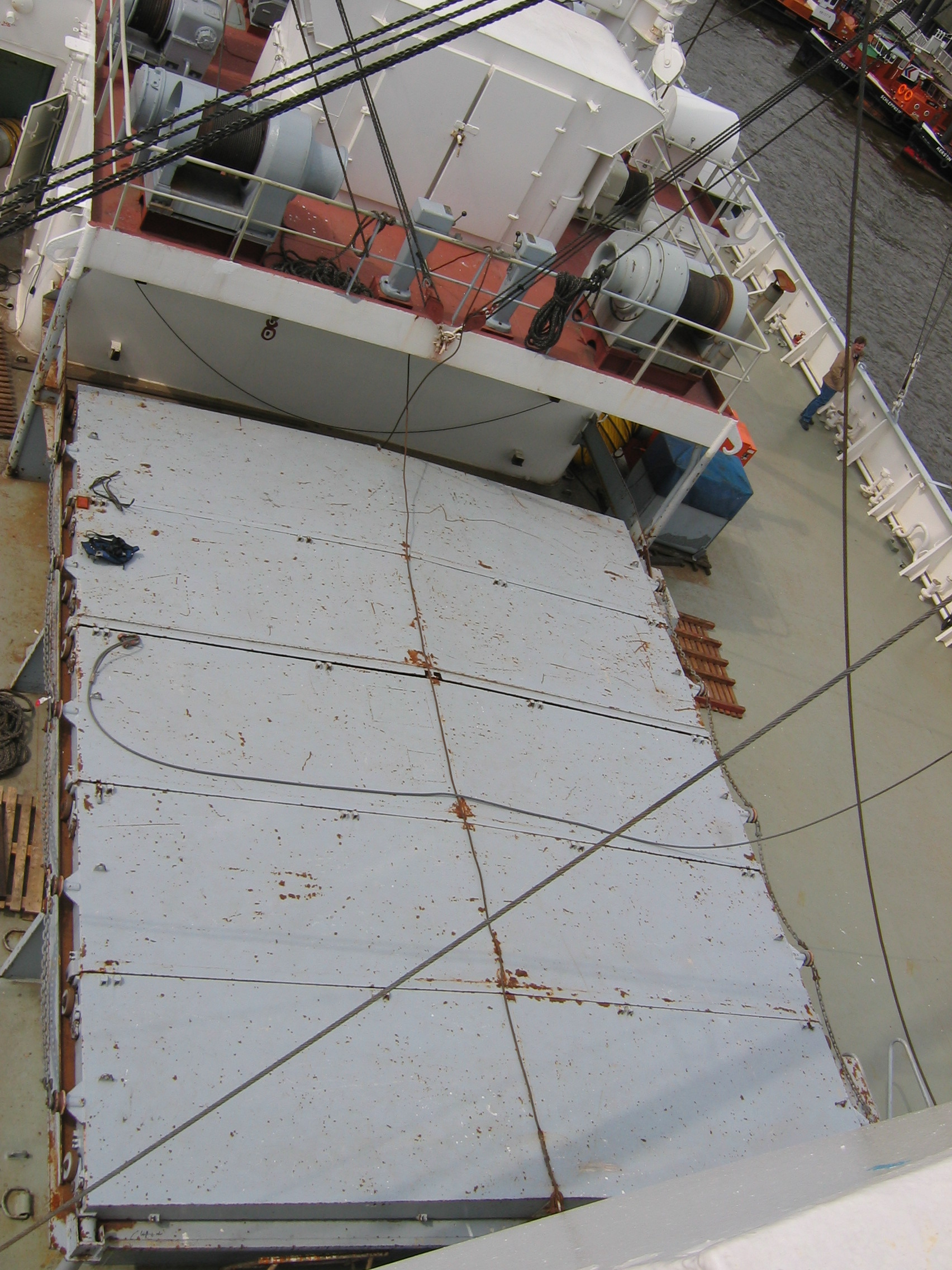 Luk ładowni MS Cap San Diego IMO Number: 5060794 MMSI Number: 211855000 Callsign: DNAI Length: 160 m Beam: 20 m